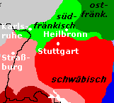 Ausschnitt aus Datei:Verbreitungsgebiet_der_oberdeutschen_Mundarten.PNG